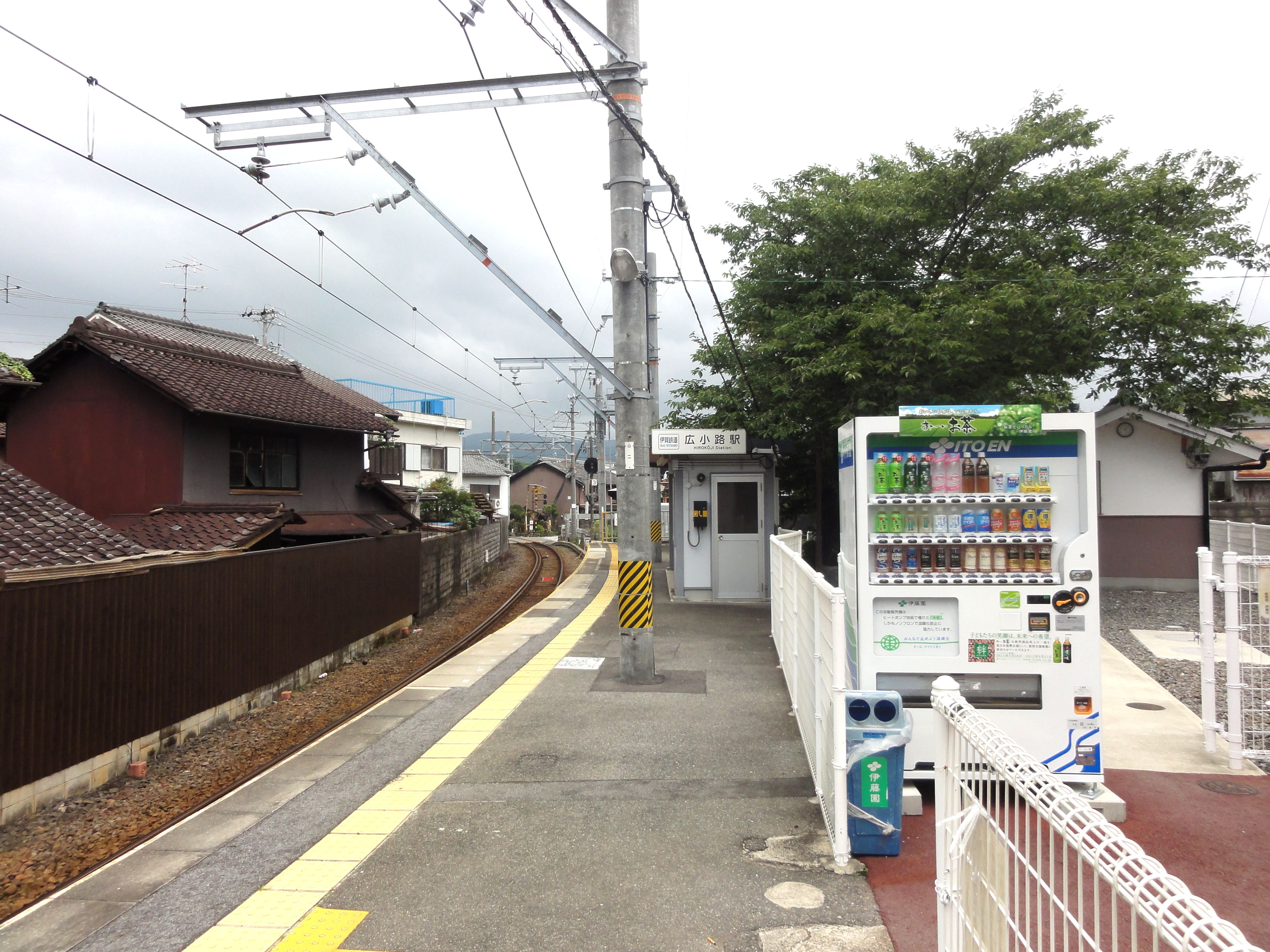 広小路駅